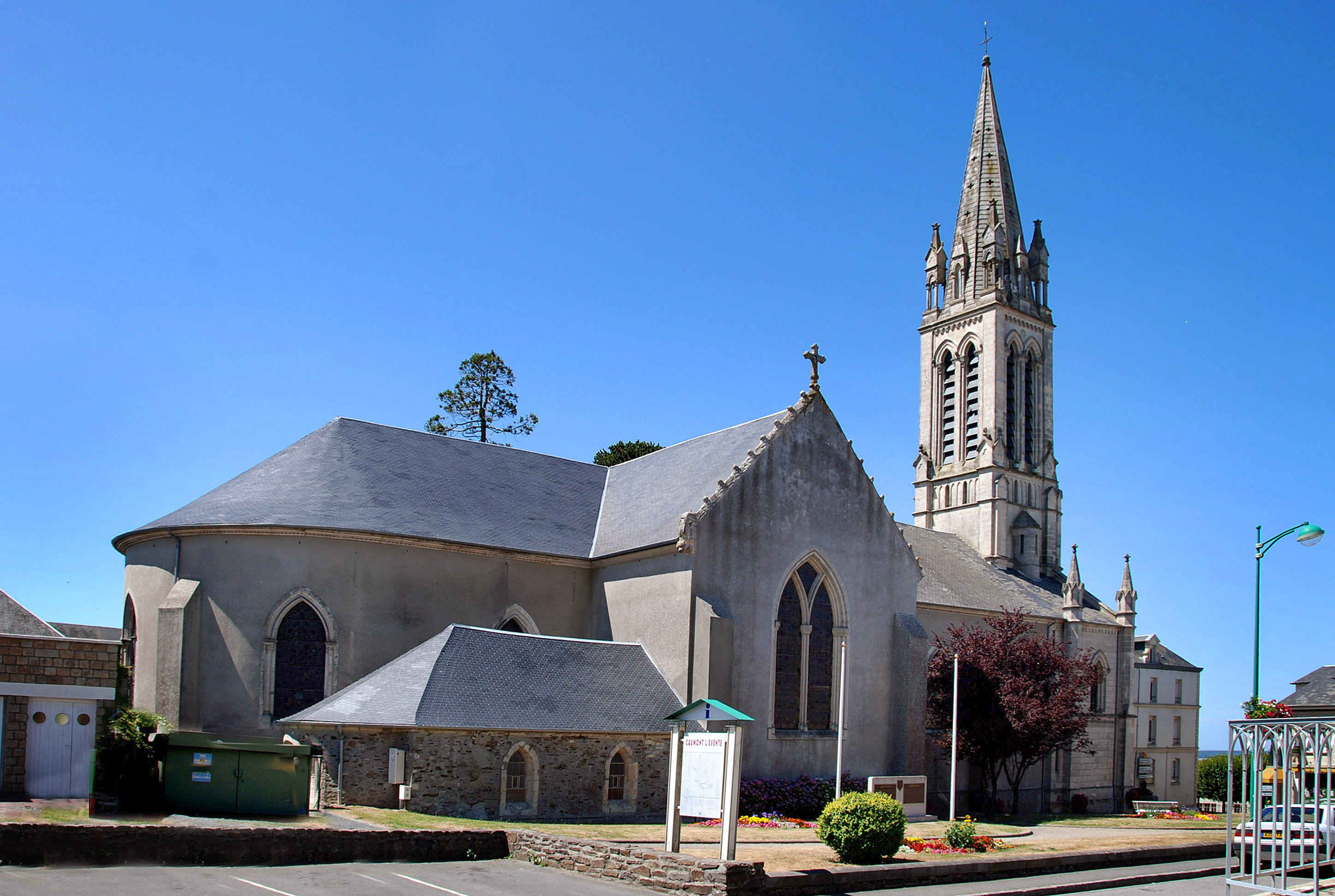 Caumont-l'Éventé (Calvados)